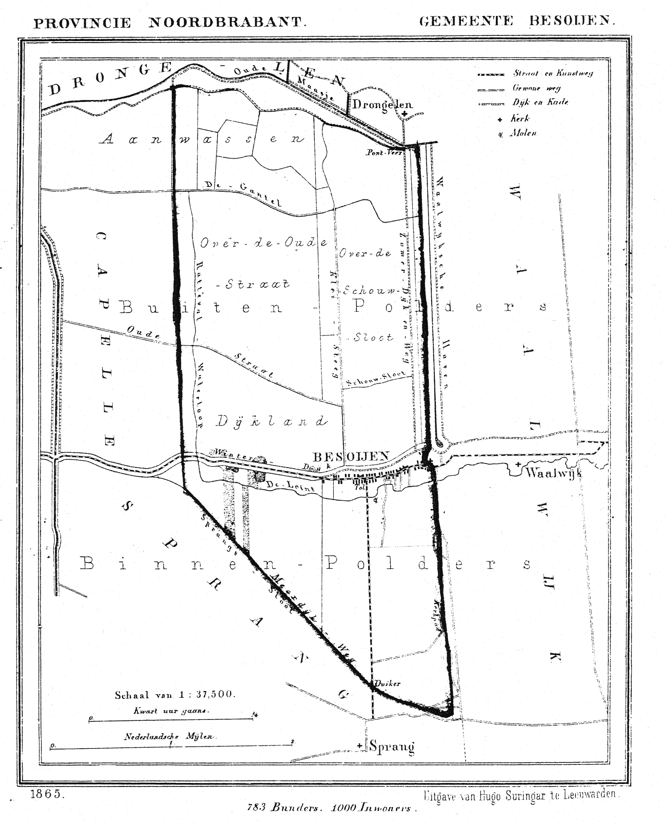 Nederland, Noord-Brabant, Gemeente Besoijen